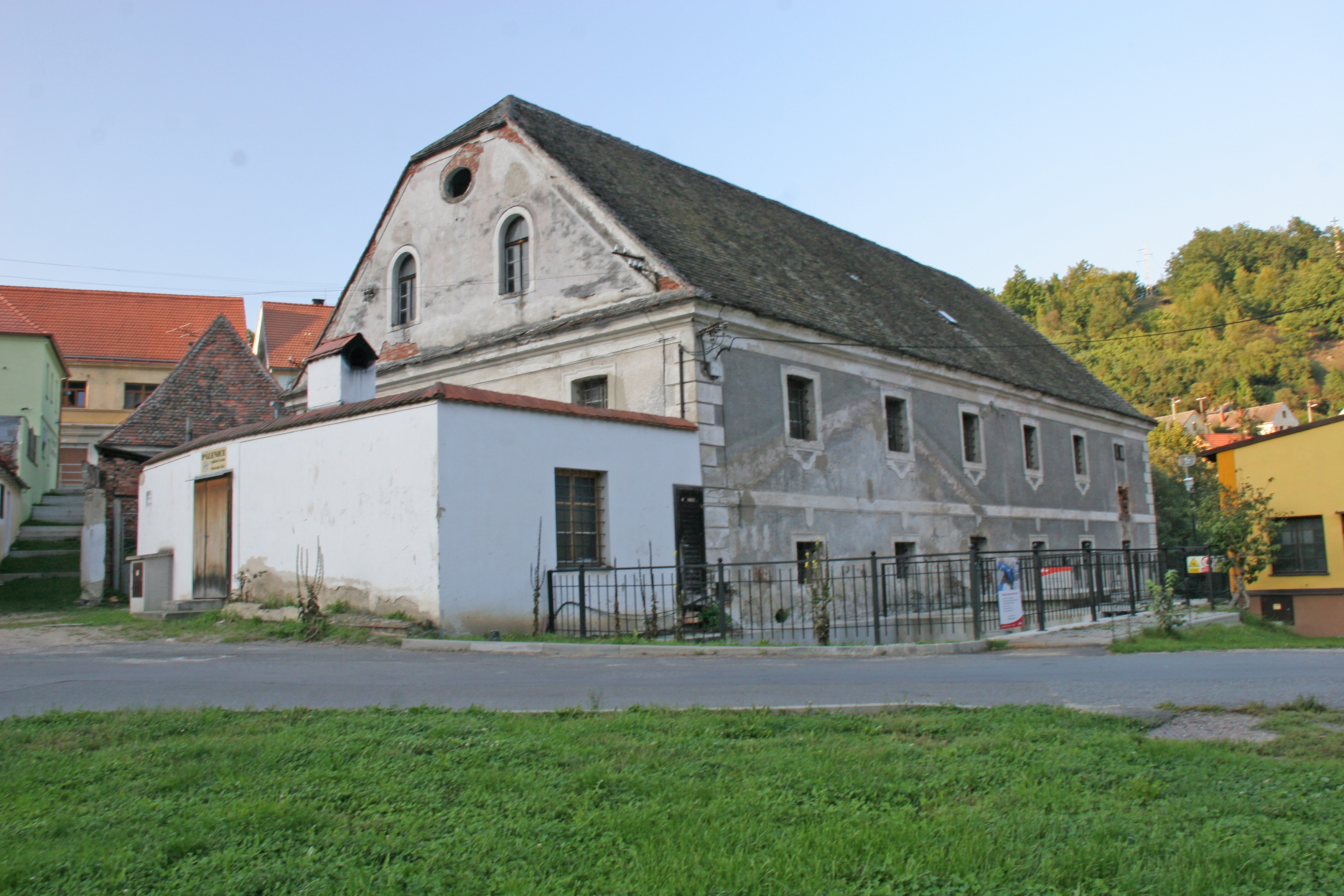 Vodní mlýn, Vranov nad Dyjí 67, Vranov nad Dyjí.